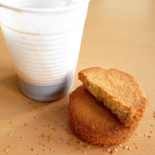 Palet breton accompagné d'un café